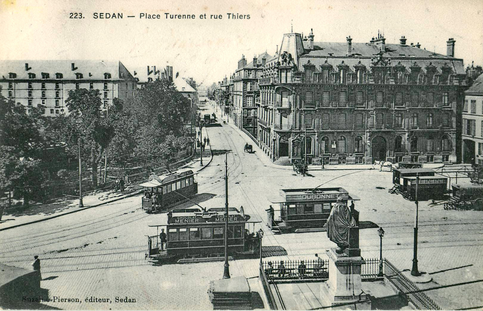 Carte postale éditée par Suzaine-Pierson à Sedan, n°223 : SEDAN : Place Turenne et rue Thiers